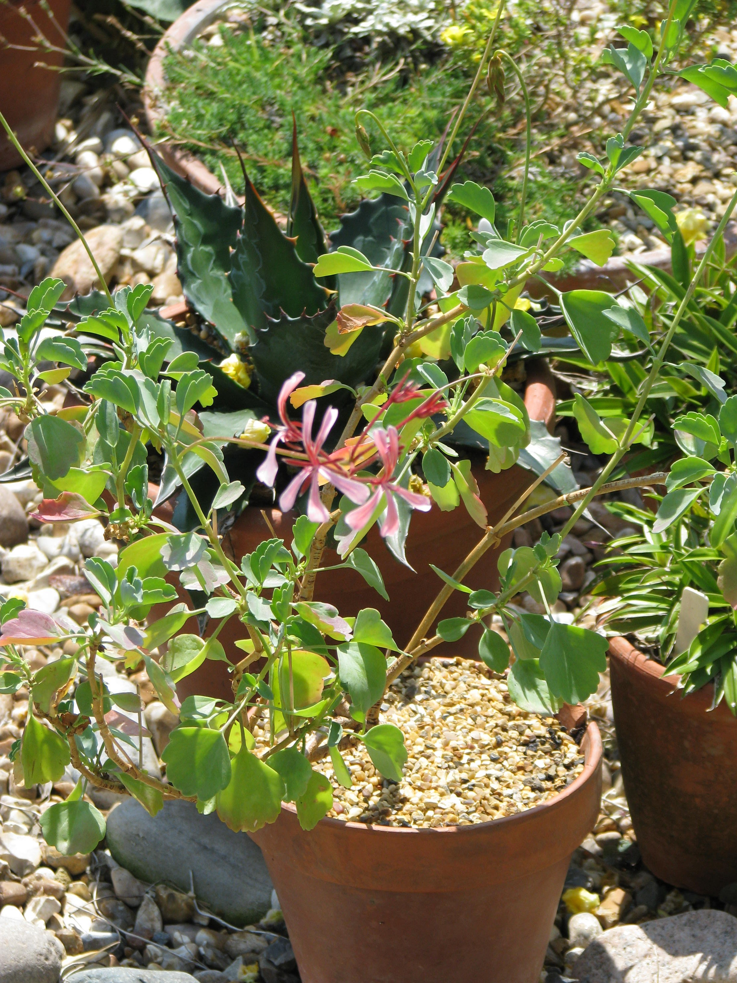 Pelargonium acetosum